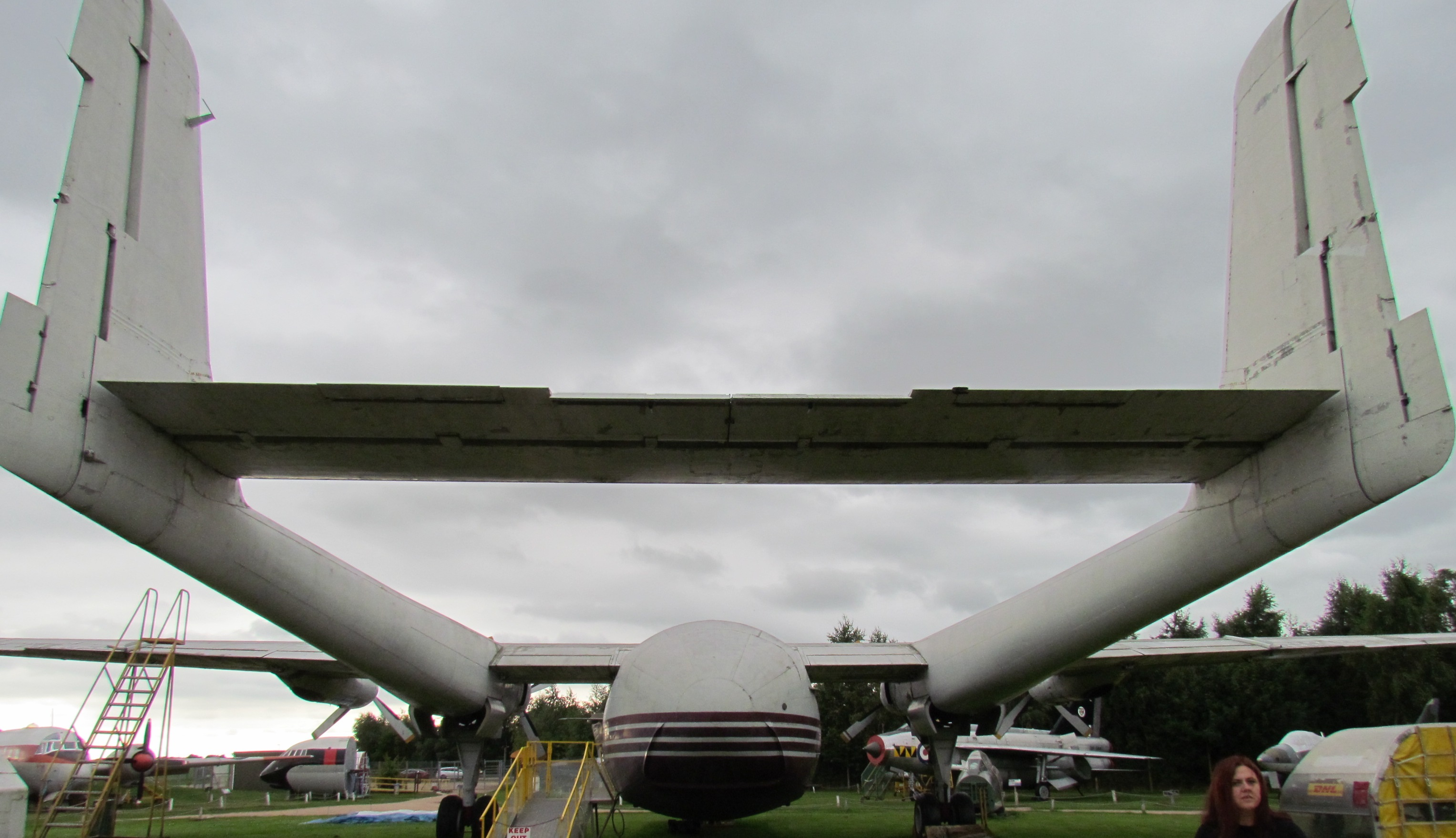 Argosy